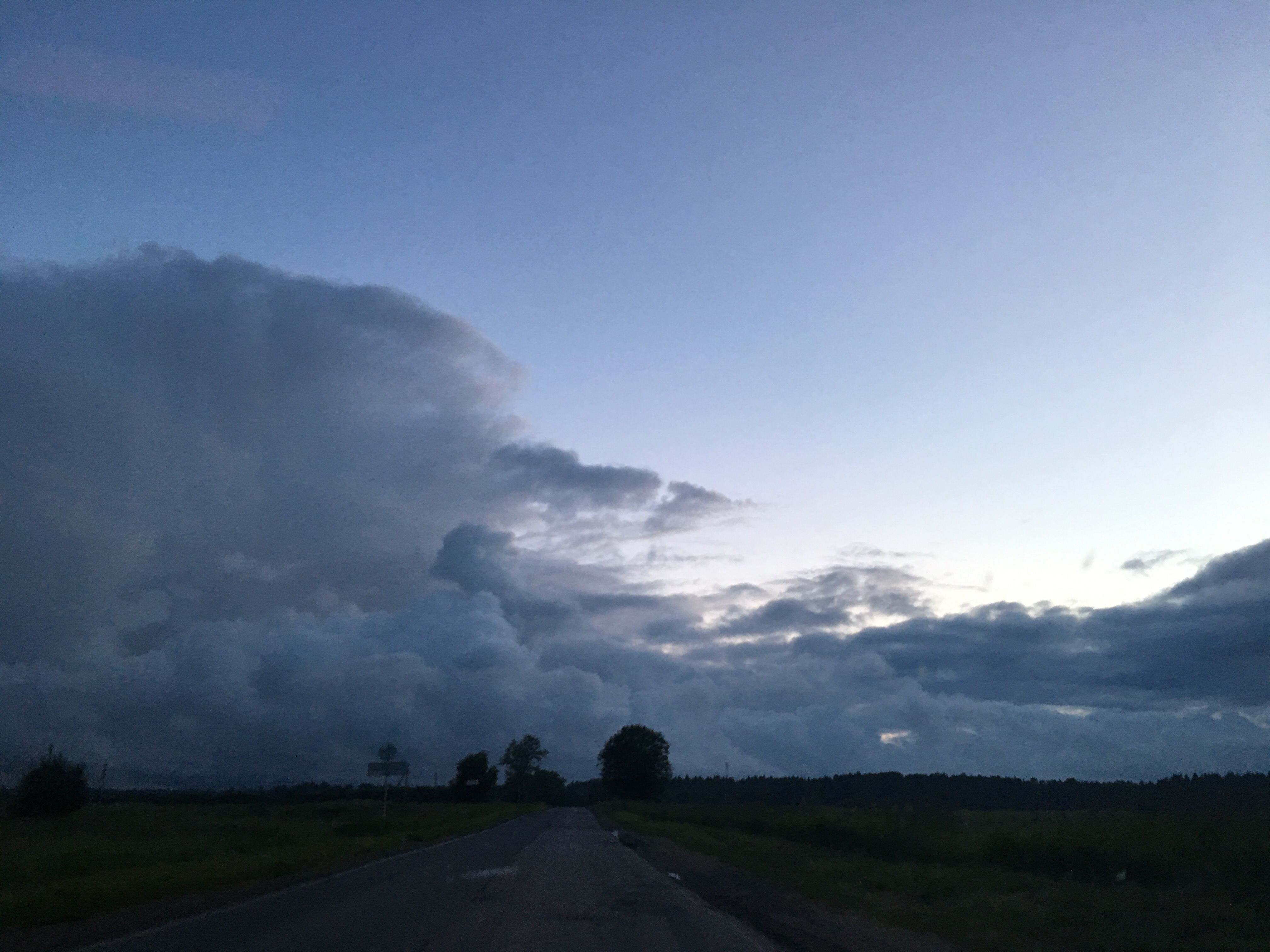 Новая Буря